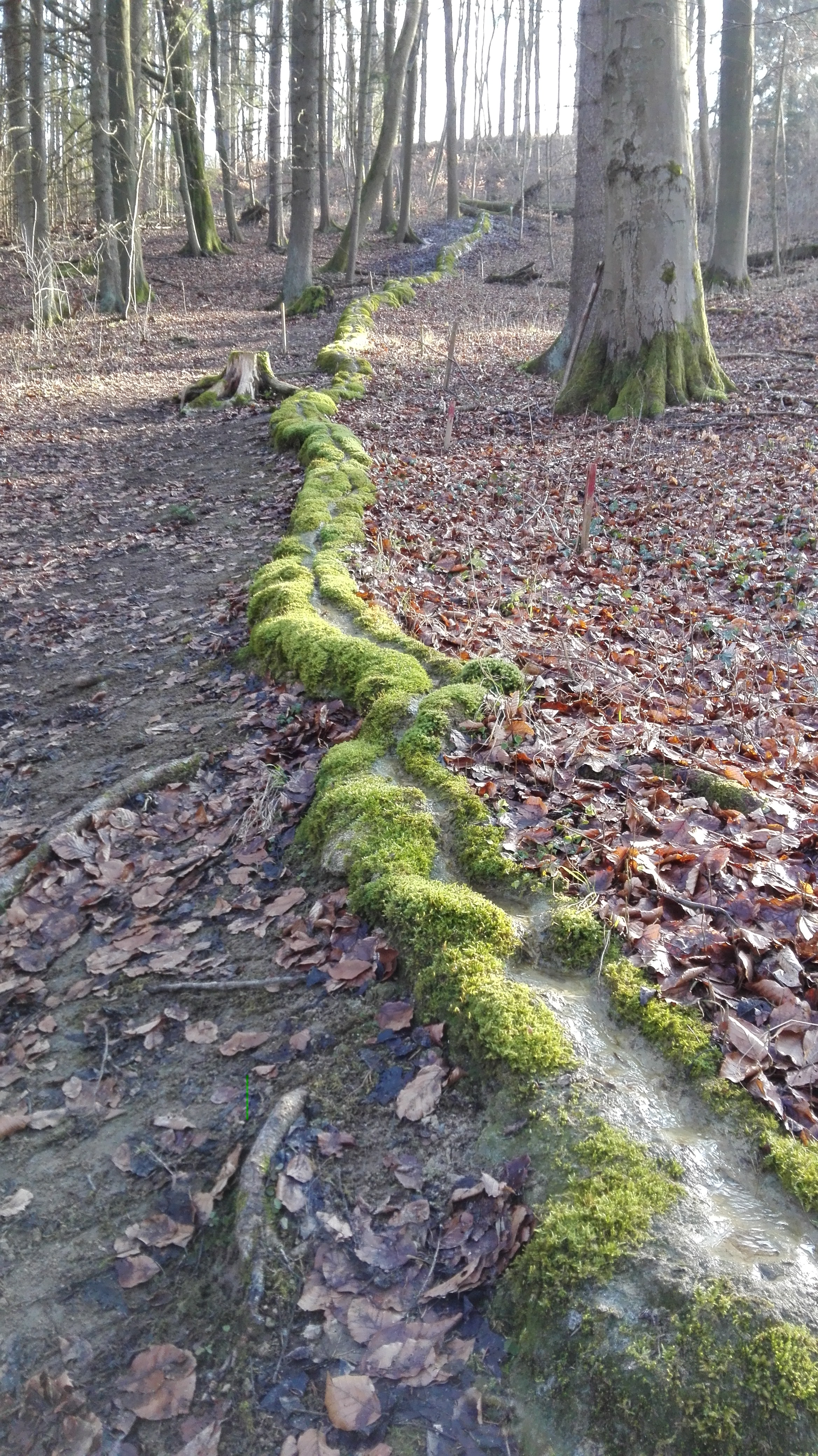 Steinerne Rinne bei Roschlaub